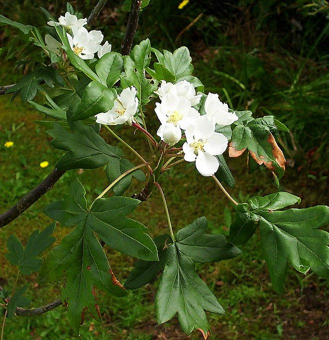 Eriolobus trilobatus (Malus trilobata)